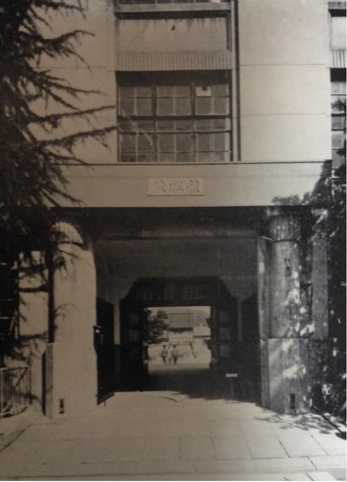 京都市立稚松小学校の正門。